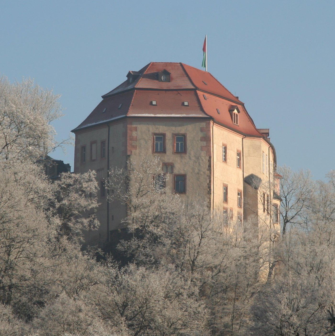 Schloss Wolkenburg an der Zwickauer Mulde